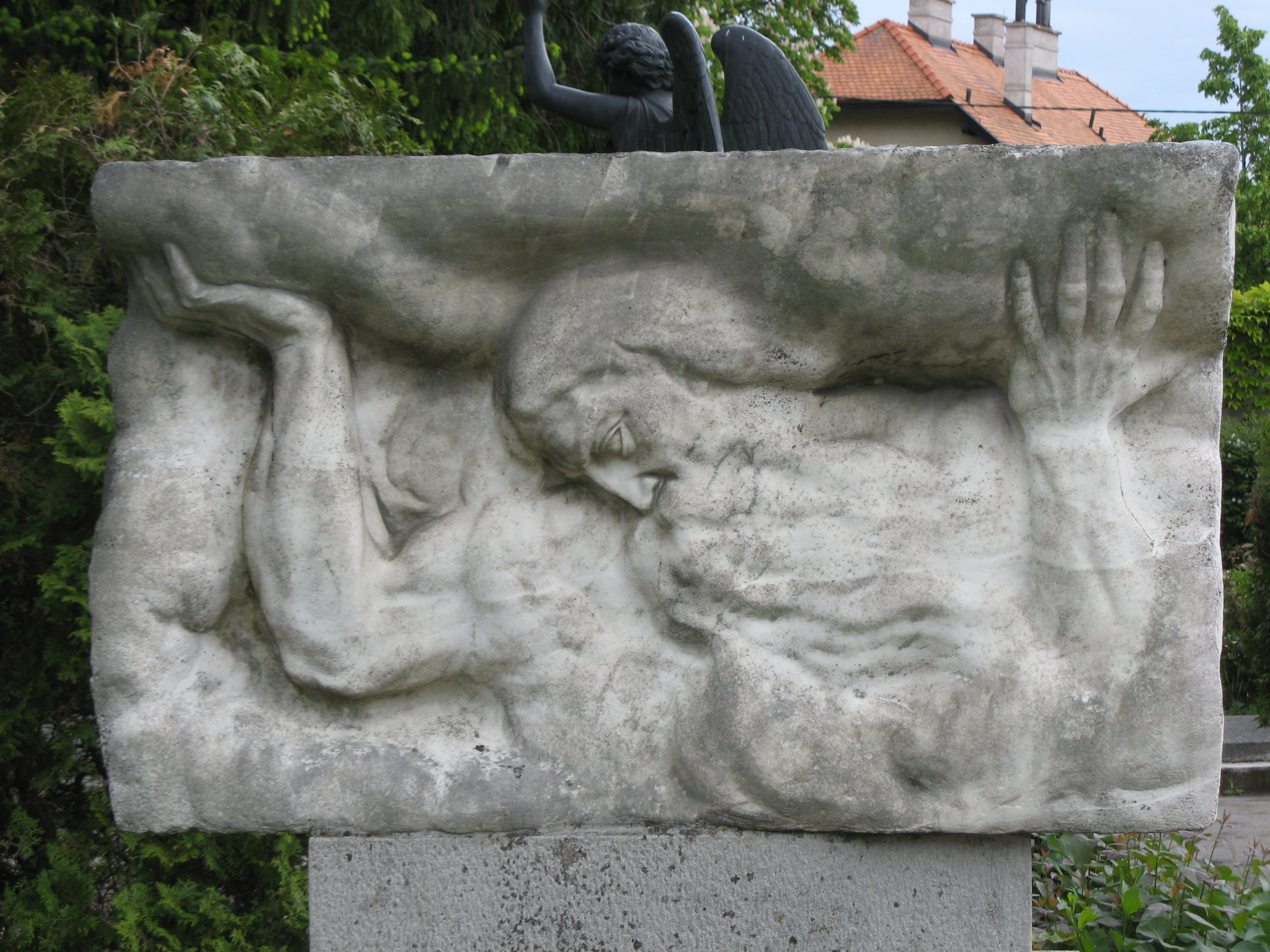 Grabmal mit Atlant (1944) von Krippel, Ober Sankt Veiter Friedhof, Wien-Hietzing